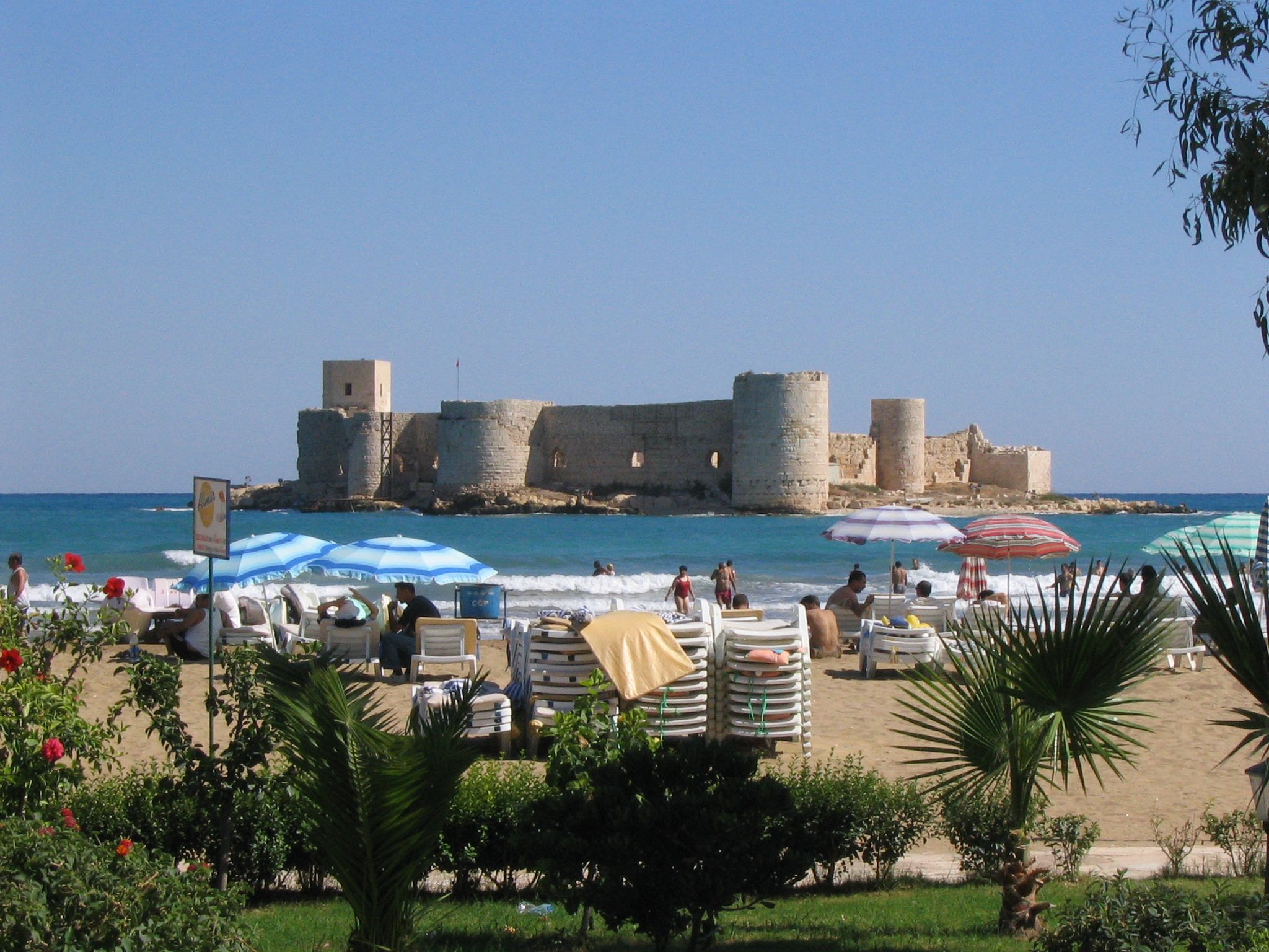 Mädchenburg bei Kızkalesi, Südtürkei